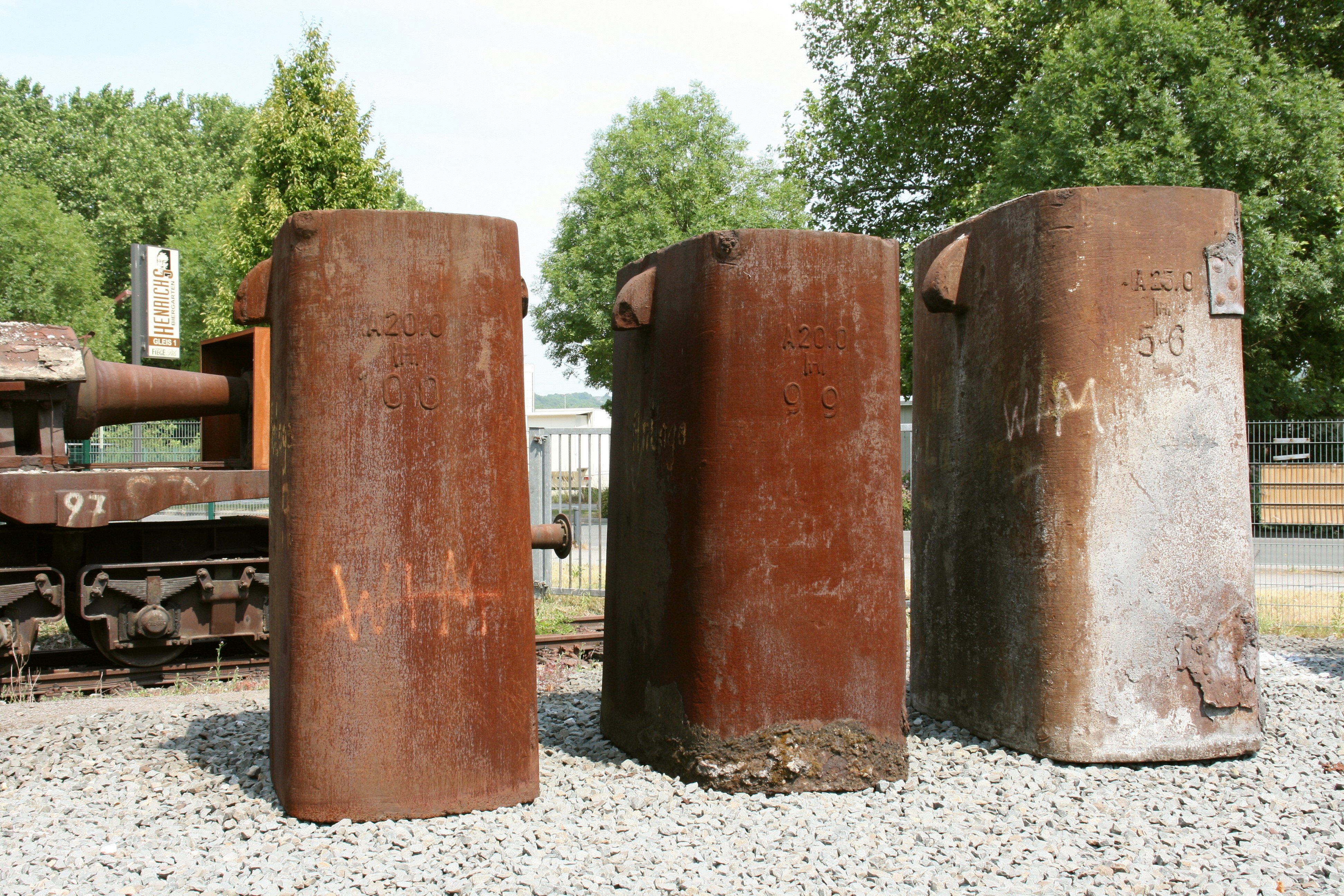 Ehemaliger Schrottplatz der Henrichshütte in Hattingen